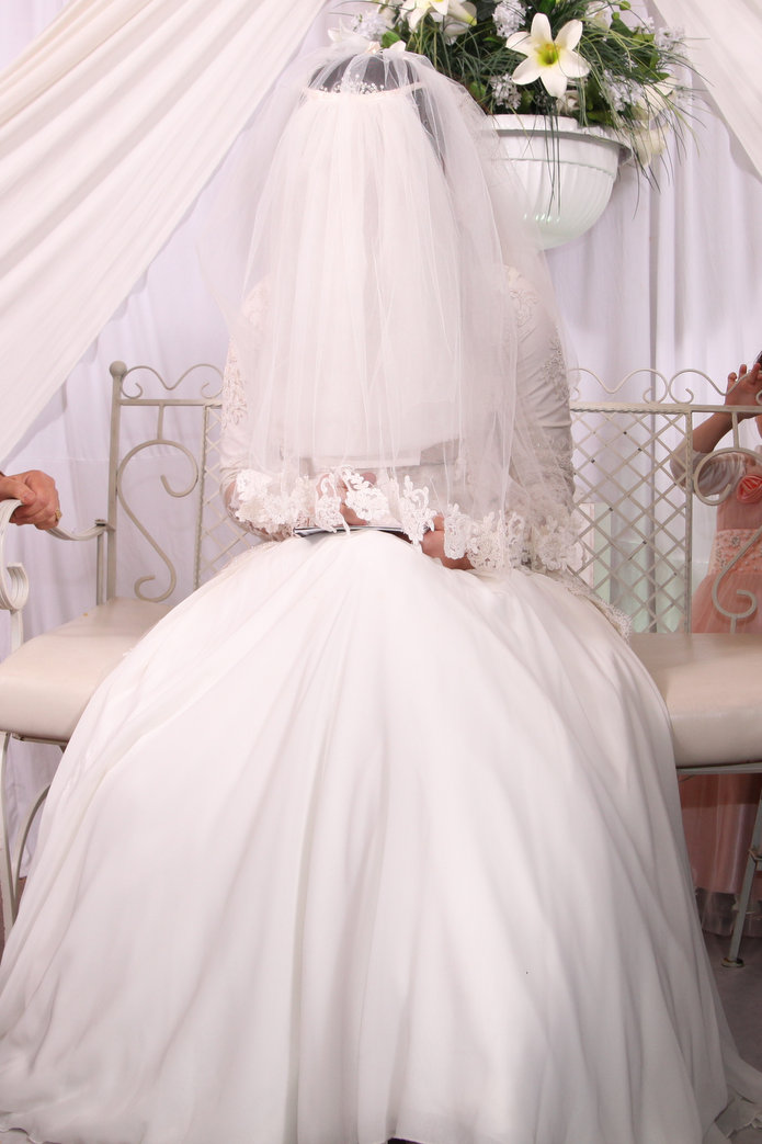 Jewish bride